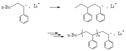 propagation PS